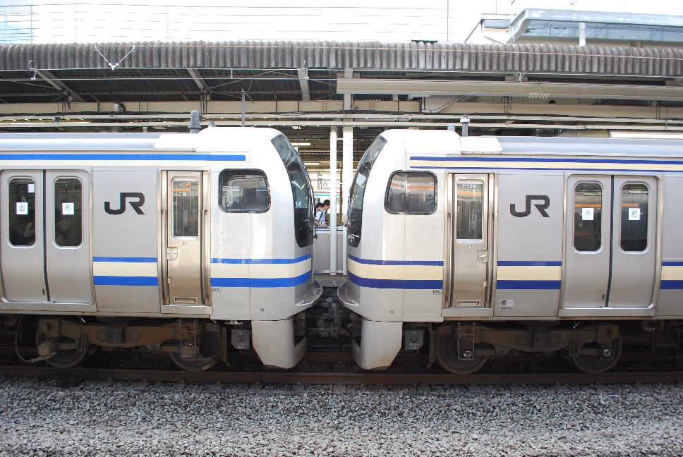 JR東日本E217系電車の機器および塗色が更新された車両（左）と未更新車両（右）の比較。